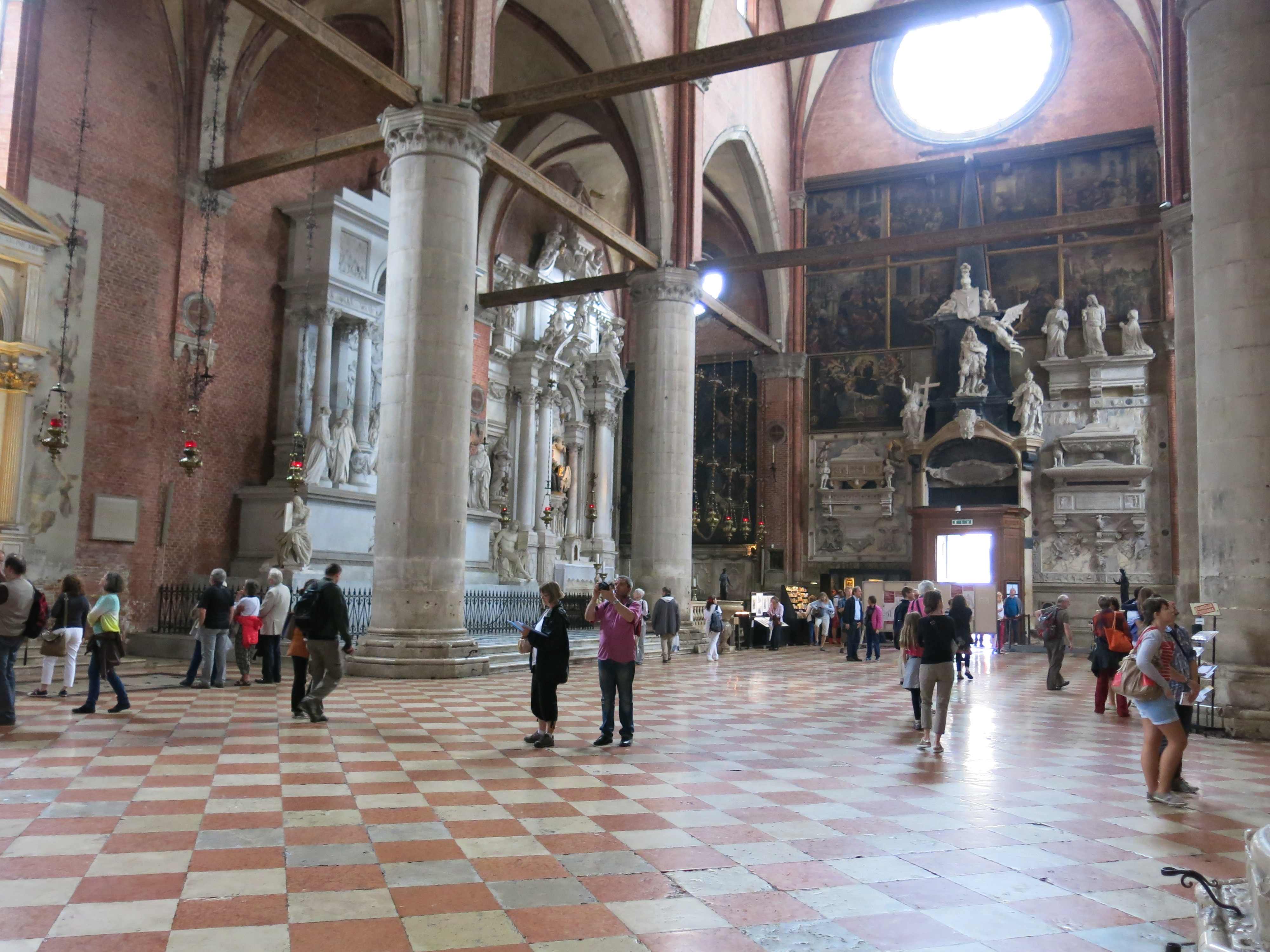 Venezia 2013